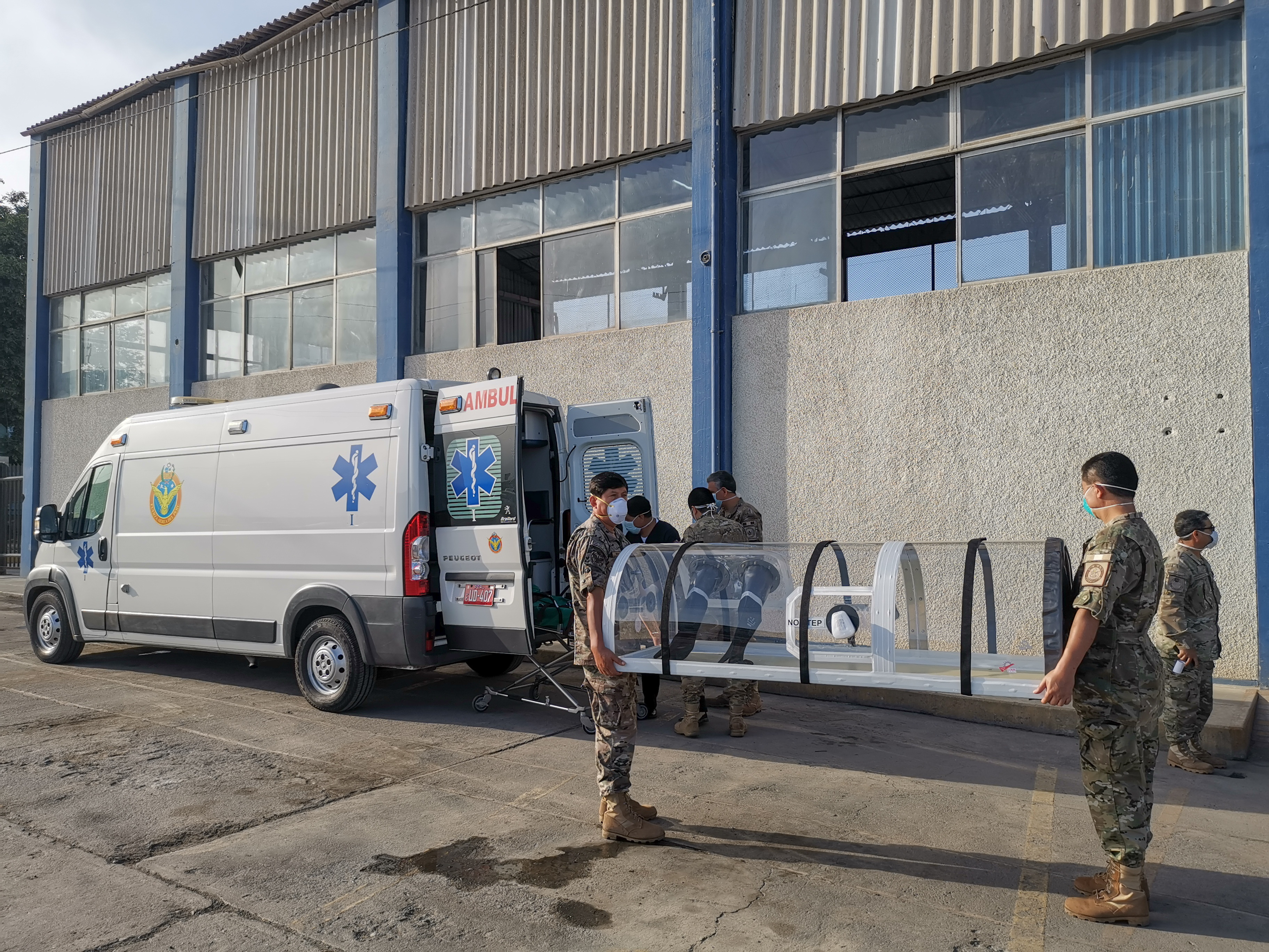 FUERZA AÉREA FABRICA CÁMARA DE AISLAMIENTO PARA TRASLADO DE PACIENTES INFECTADOS